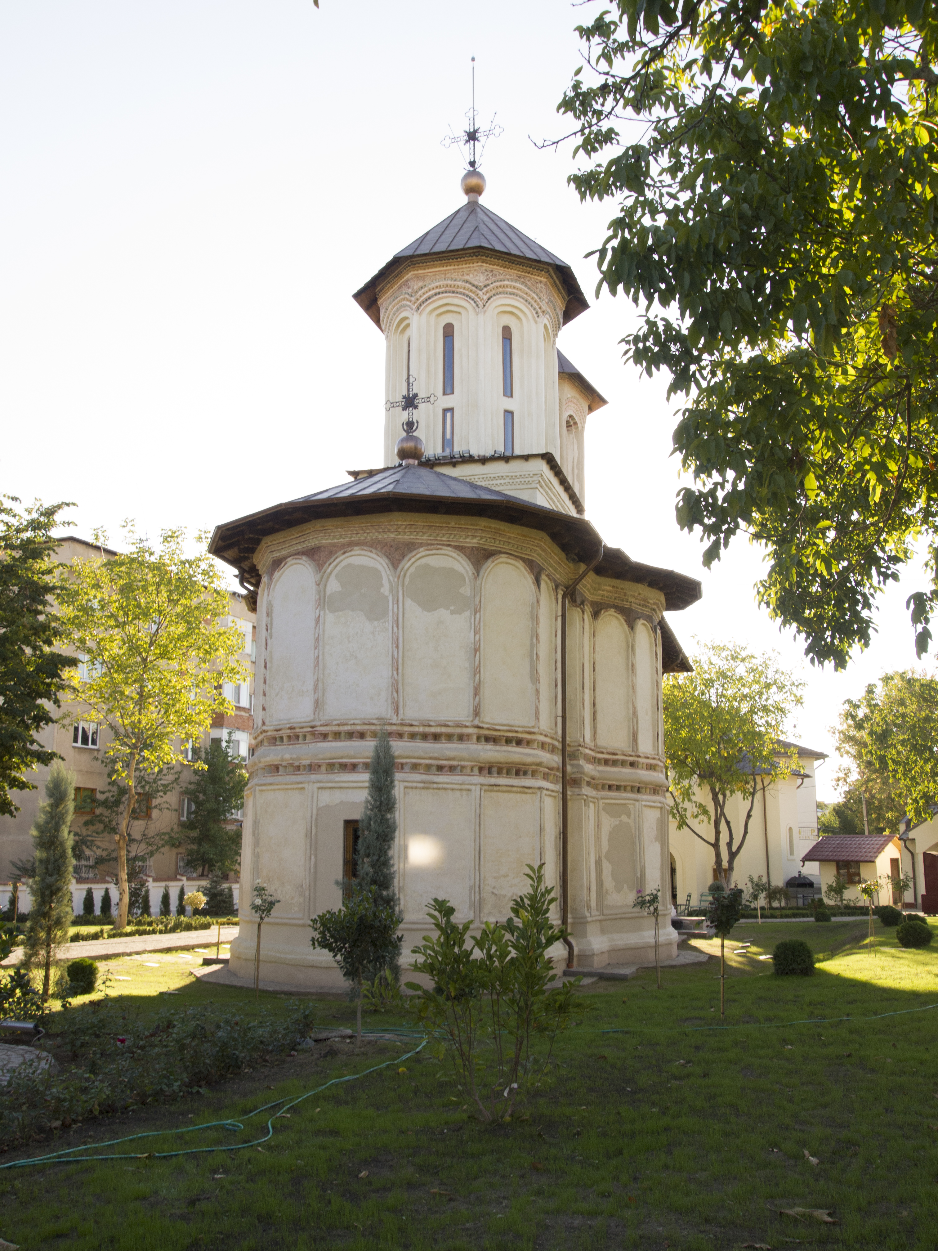 Ansamblul bisericii "Sf. Nicolae"- Amaradia (Belivacă)